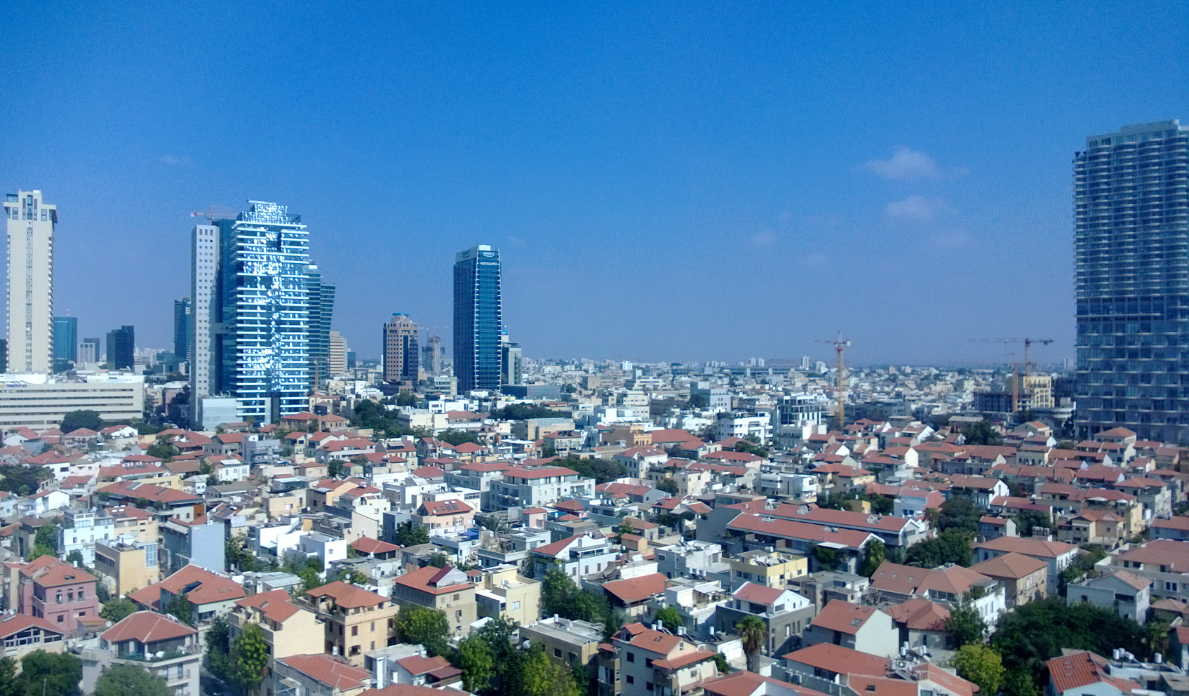 נווה צדק היא השכונה היהודית הרשמית הראשונה מחוץ לתוואי חומות העיר יפו (החומות עצמן נהרסו מספר שנים קודם). נוסדה ב-1887.